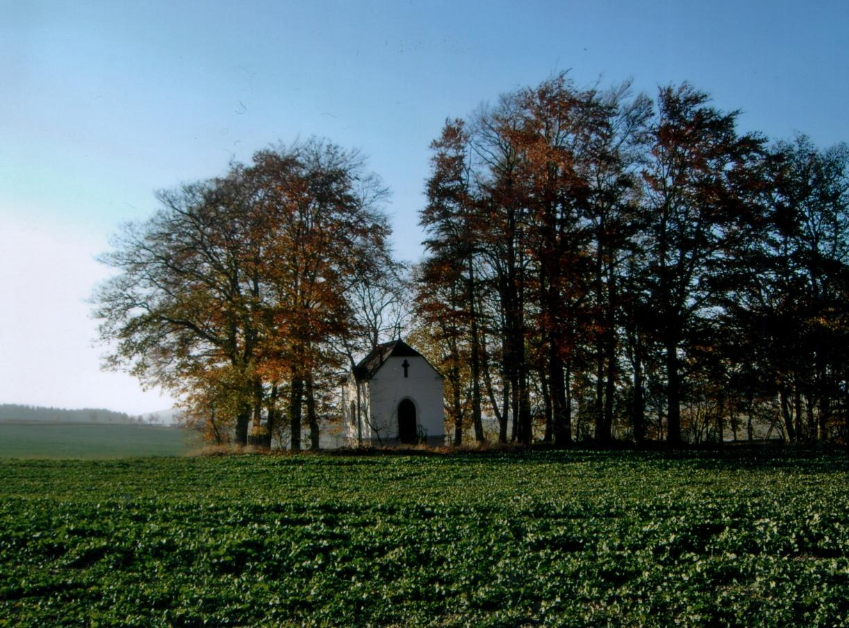 Kapelle in der Nähe der kahlen Höhe in Oberreichstädt im Jahre 2005